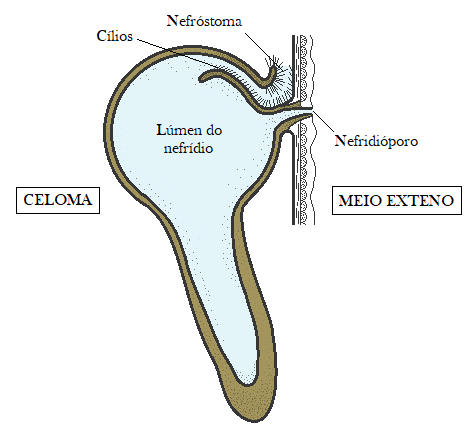 O esquema representa um nefrídio, estrutura responsável pela excreção em Sipuncula que apresenta como principais regiões o nefróstoma, canal interior e nefridióporo.